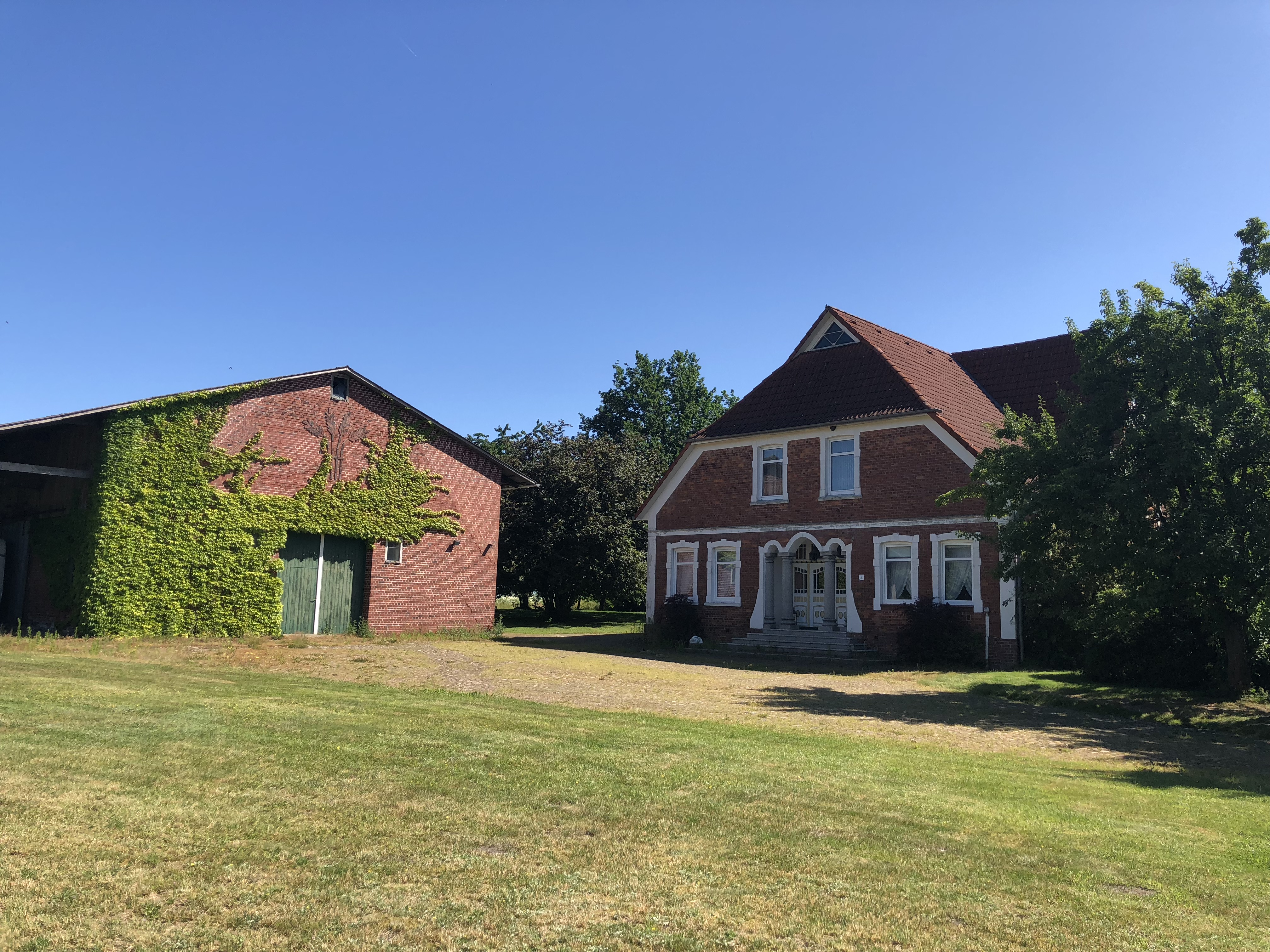 Hoff in Ruschwedel